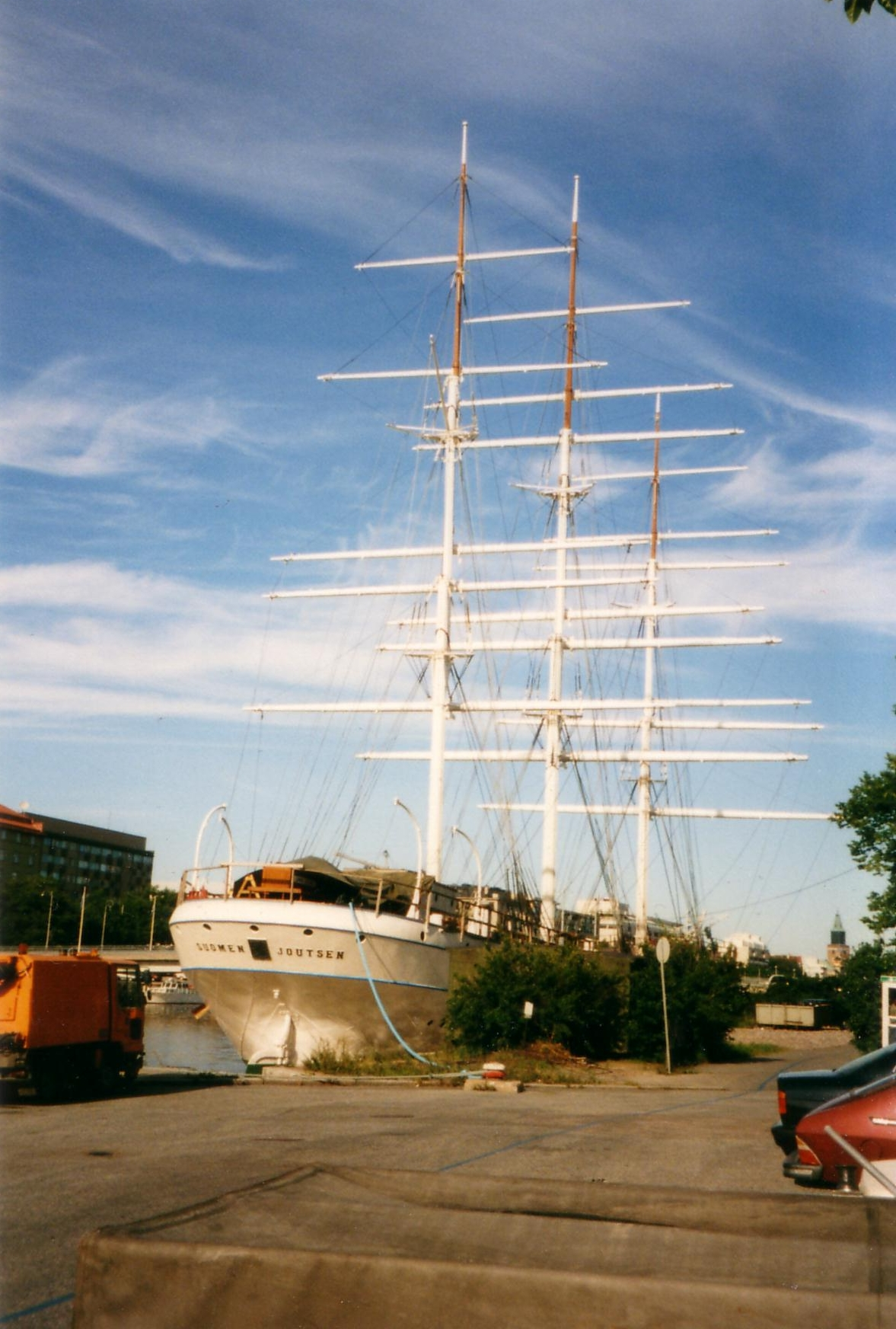 Das Segelschgiff "Suomen Joutsen" (Finnischer Schwan) auf dem Aurajoki. Rechts im Hintergrund der Turm des Doms.